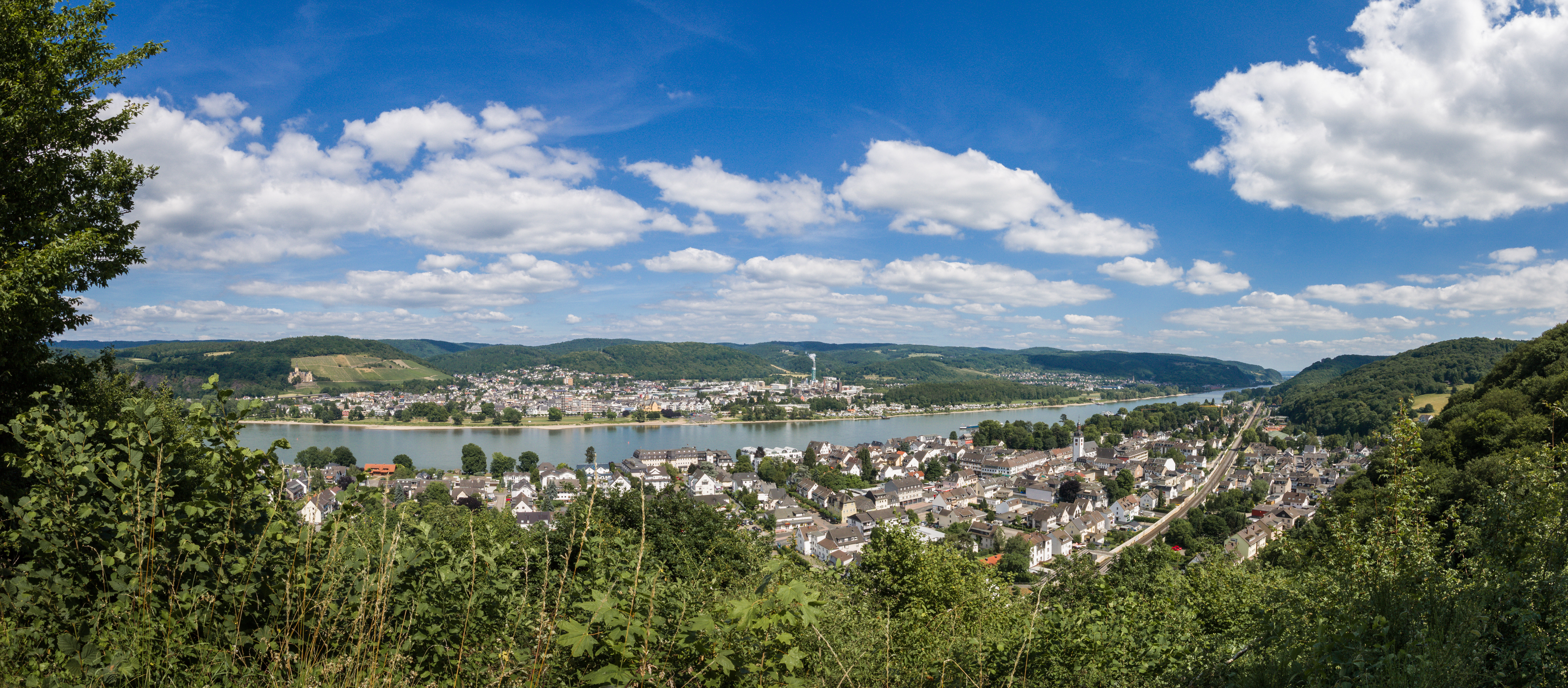 Panoramablick auf Bad Breisig und Bad Hönningen